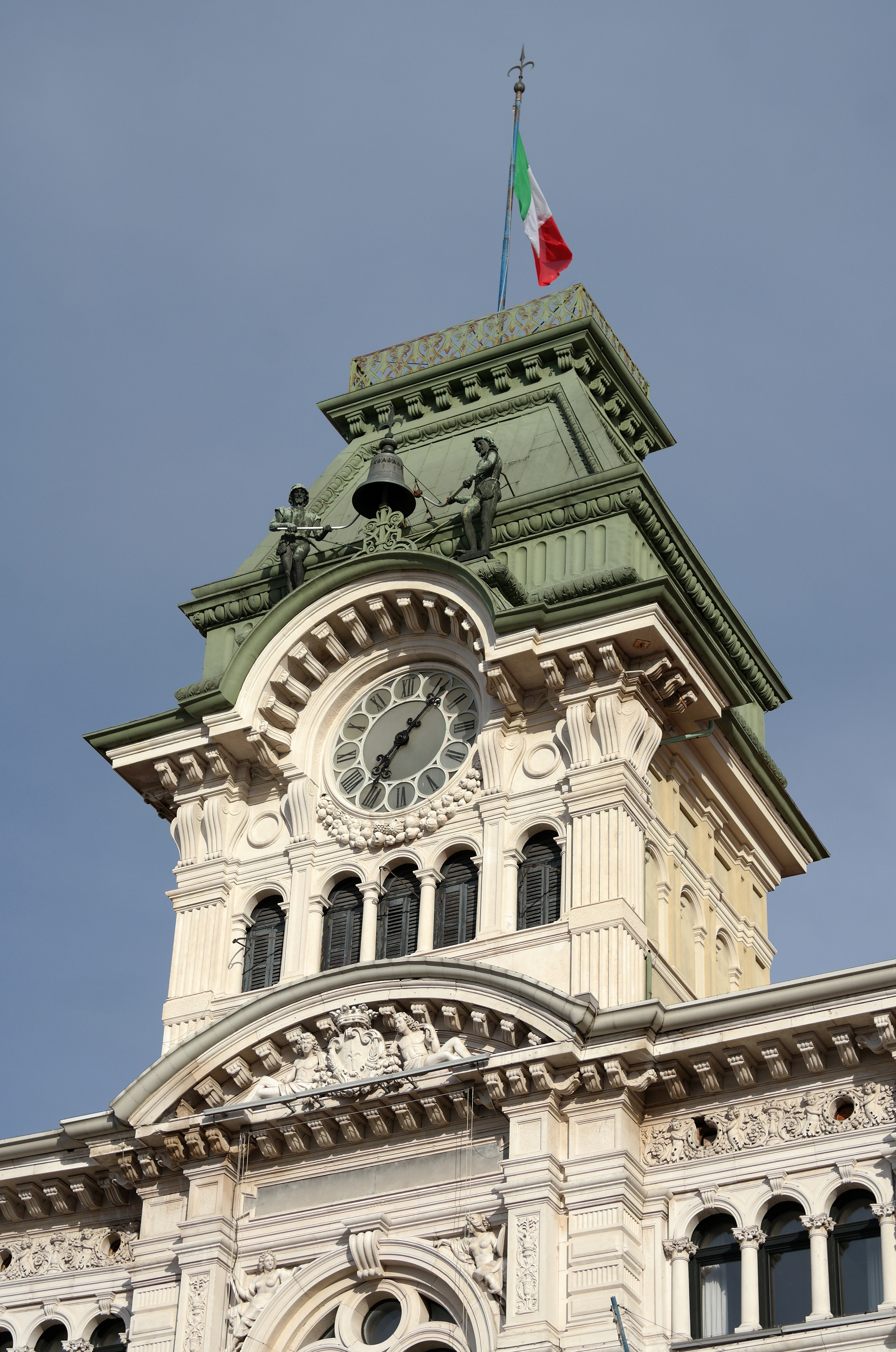 Dettaglio della torre del municipio di Trieste, in Piazza Unità d'Italia